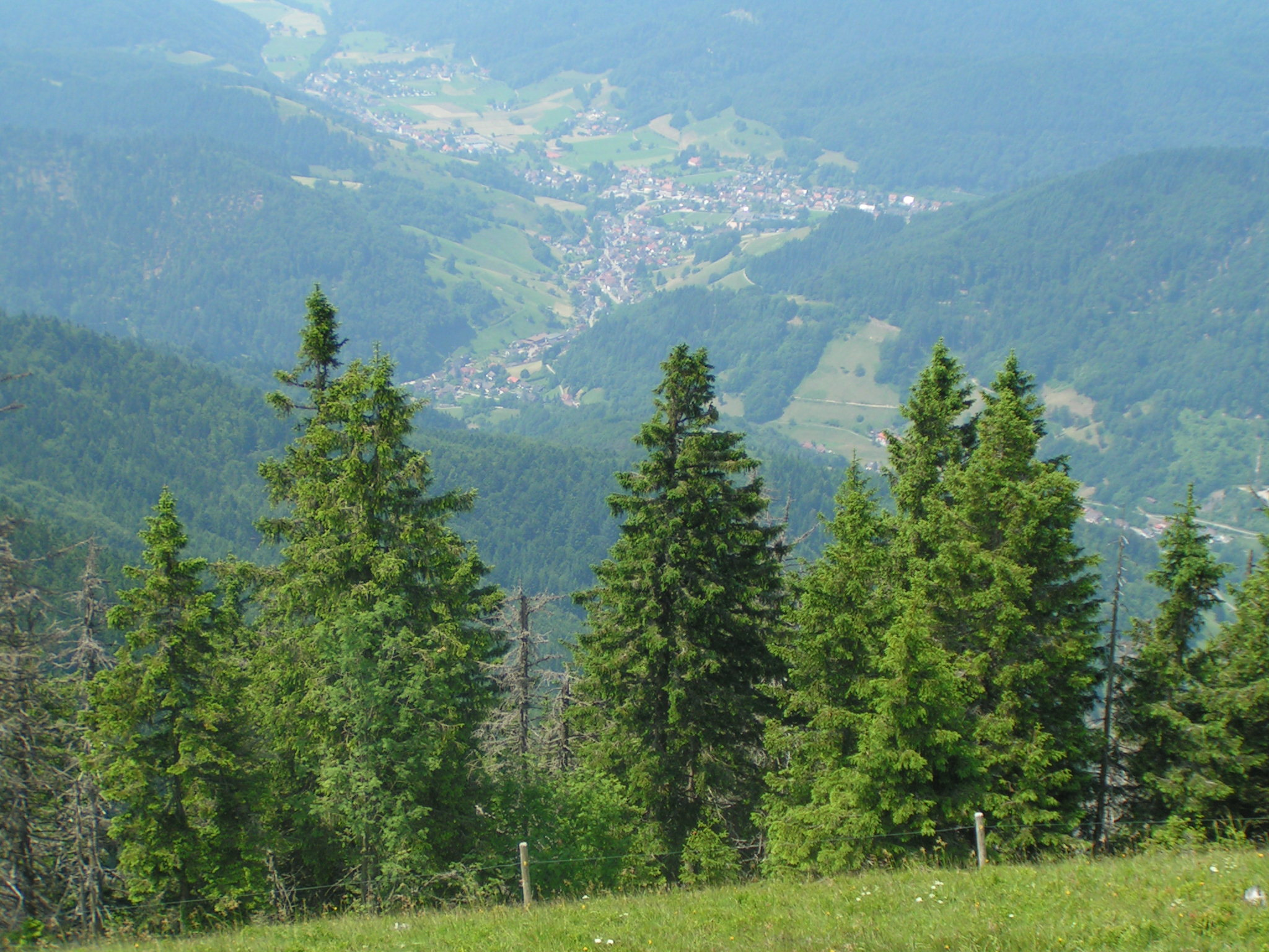 Blick vom Belchen auf Kaltwasser (Gemeinde Münstertal/Schwarzwald)